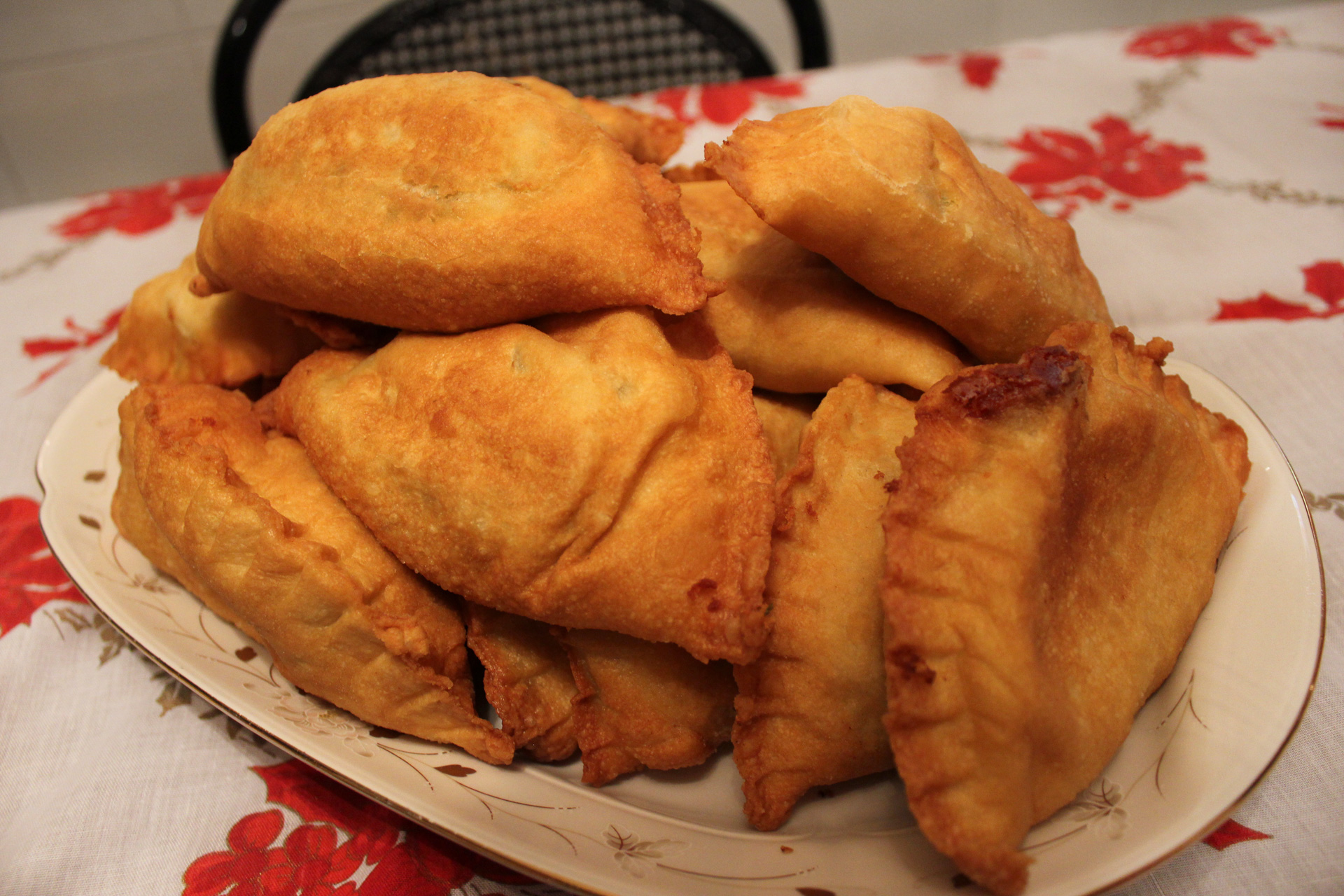 Come da tradizione, fritti e dorati nella parte esterna, serviti tutti insieme.